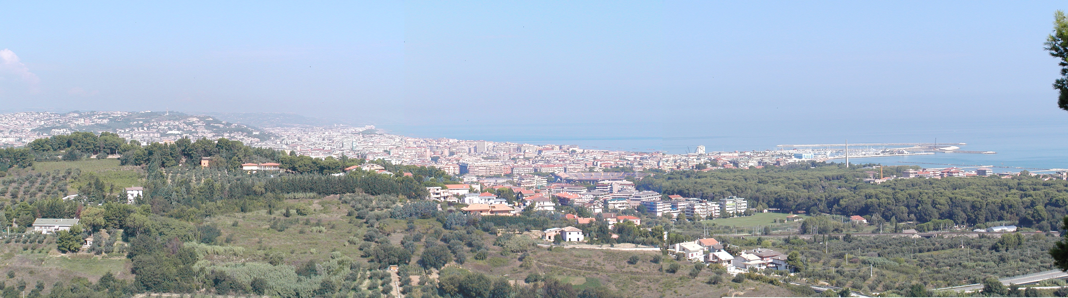 Panaorama von Pescara (mittelgroß)